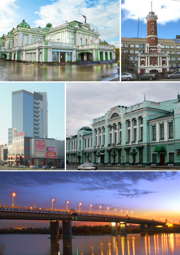 Коллаж из фотографий города Омска (Россия). По часовой стрелке: Слева вверху - Омский театр драмы. Справа вверху - историческое здание пожарной каланчи. Справа - музей им. М. А. Врубеля. Внизу - метромост над Иртышом. Слева - современный торгово-офисный центр "Фестиваль".